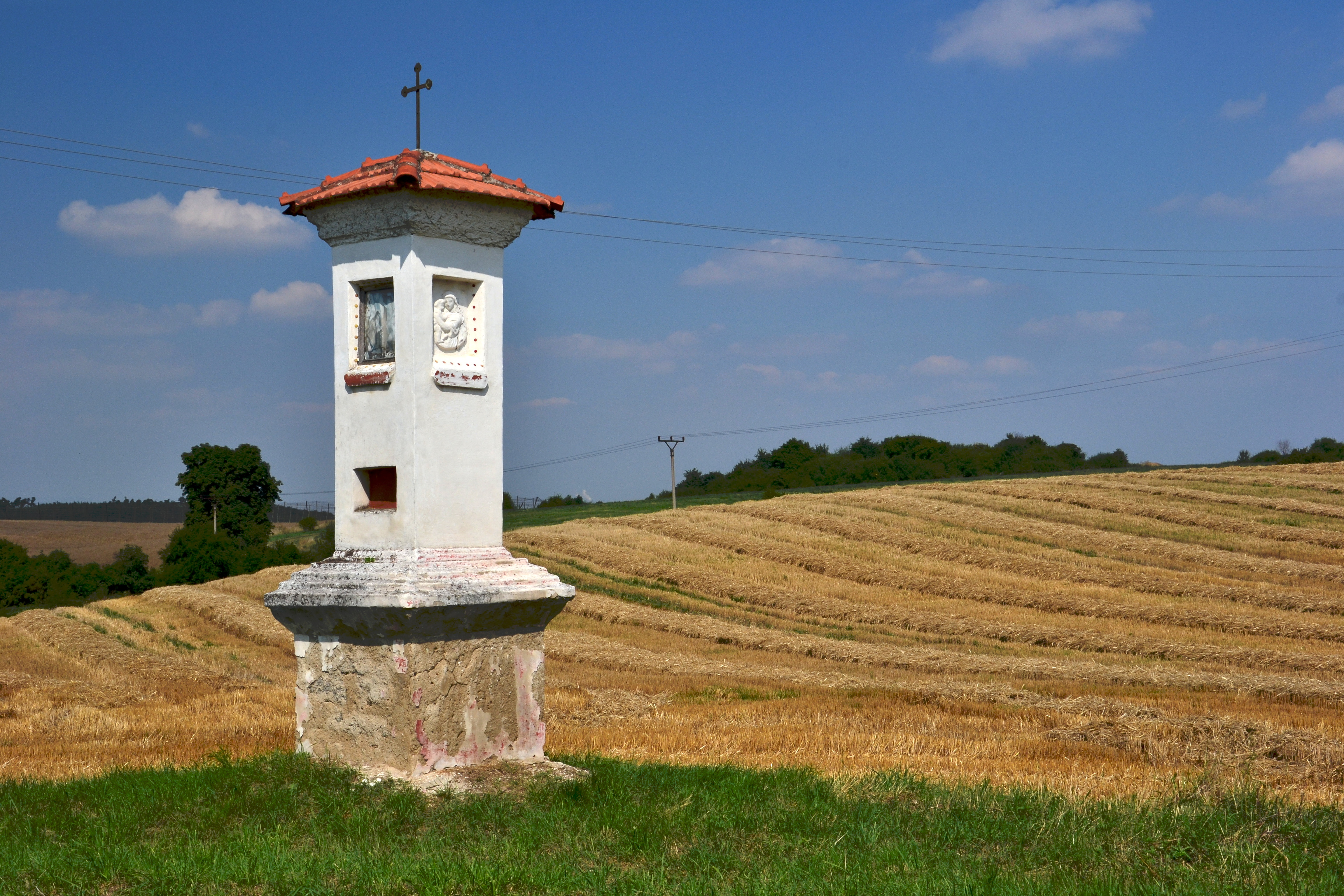 Boží muka (Měcholupy), při silnici ke Lhotě, Měcholupy